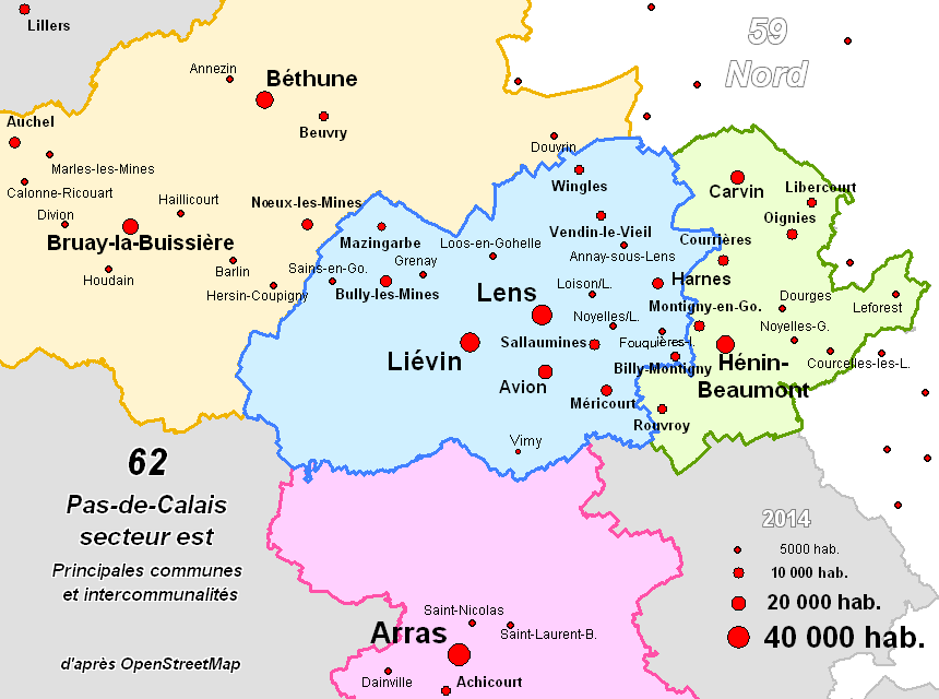 Carte de l'est du Pas-de-Calais (Béthune, Lens, Liévin, Arras, Hénin) avec les principales communes (5000 hab. et plus) et les principales intercommunalités mises à jour au 1er janvier 2014.